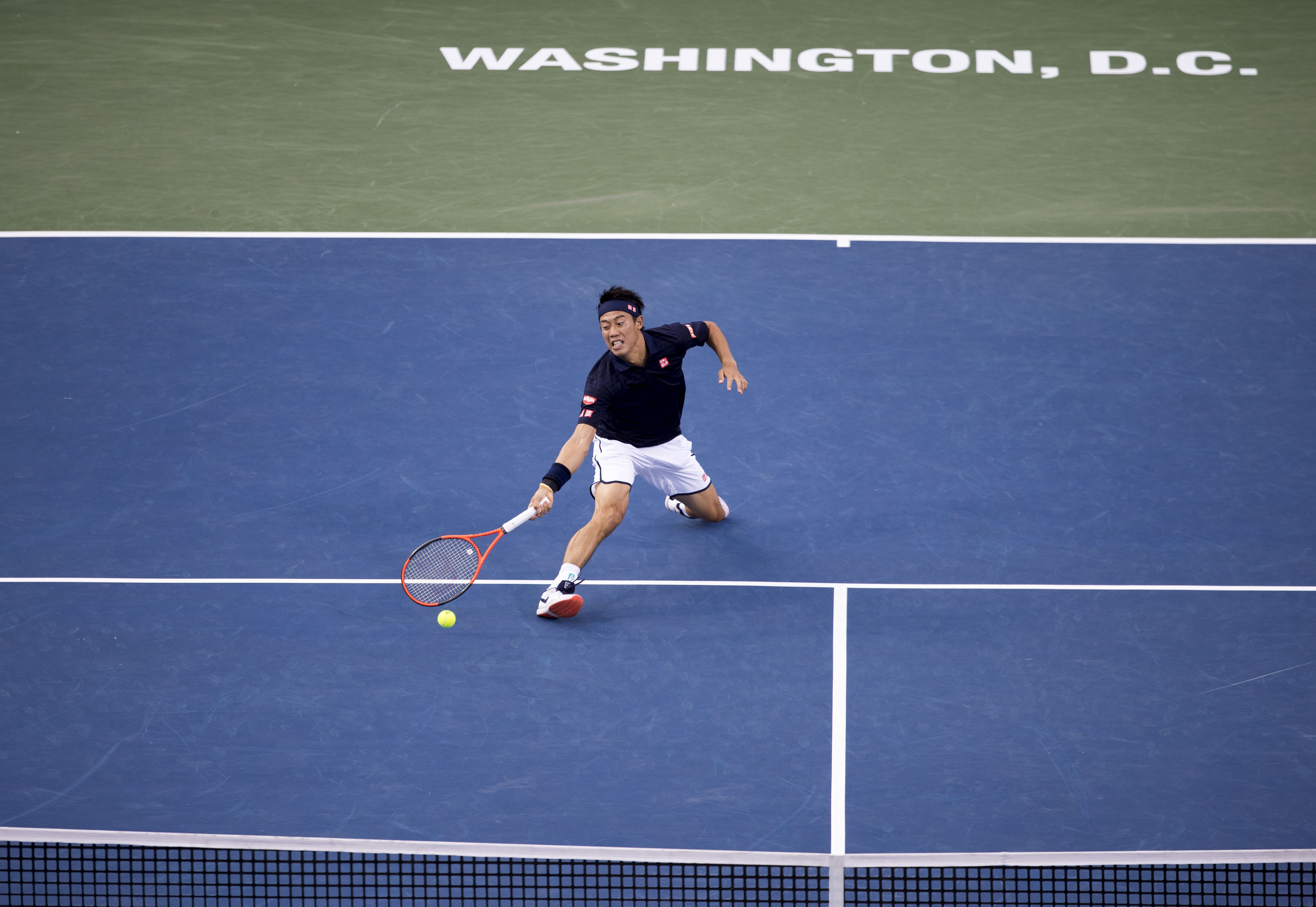 Citi Open Tennis 2017